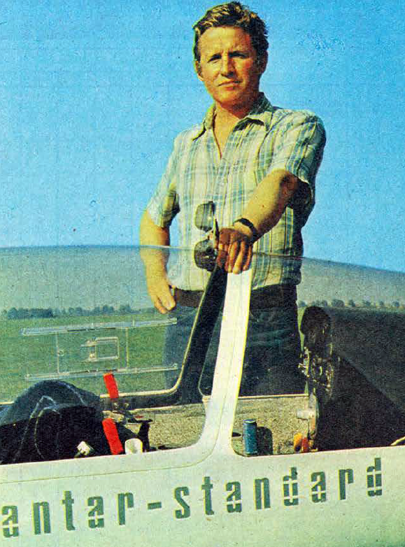 Franciszek Kępka